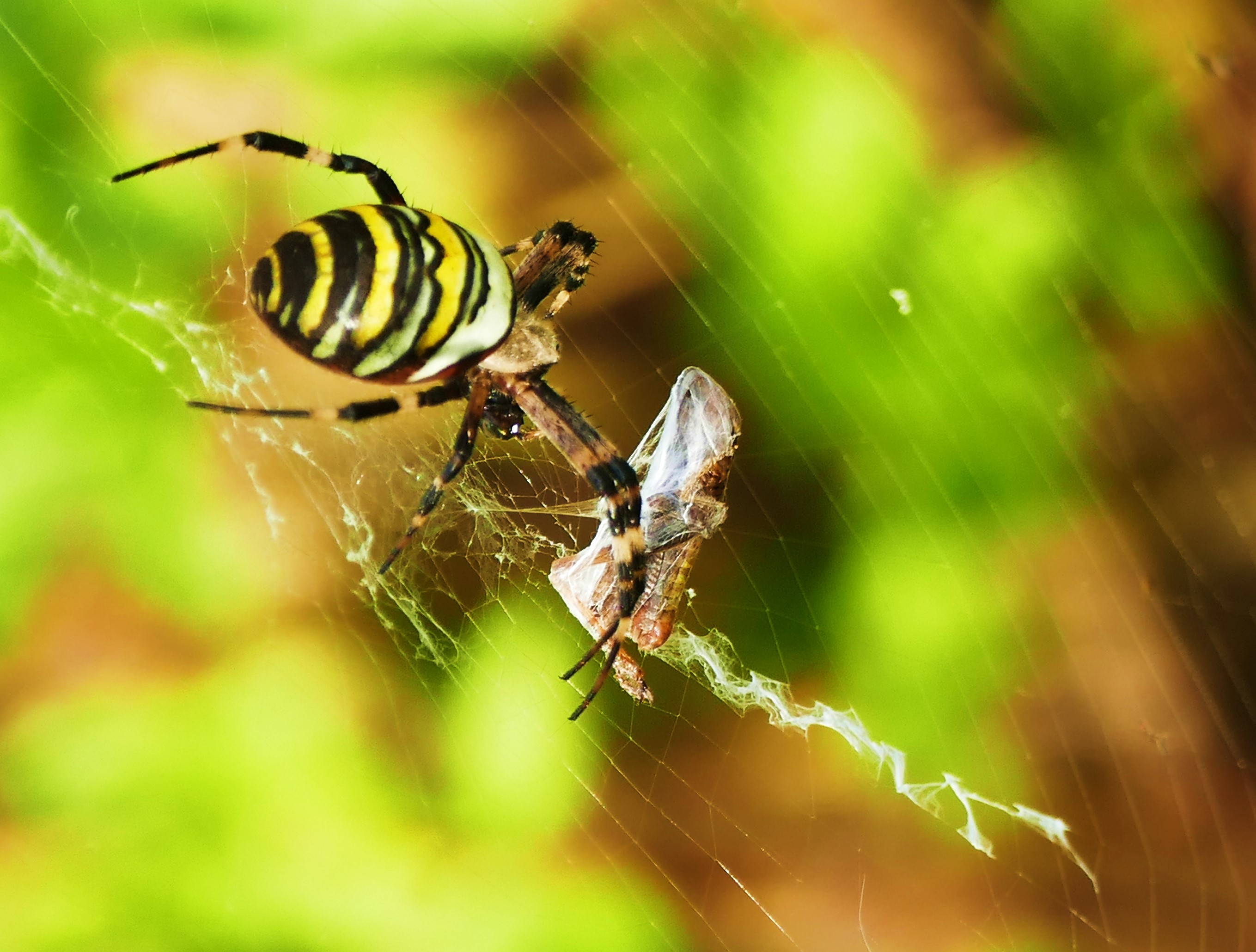 Wespenspinne mit Beute-Grashüpfer